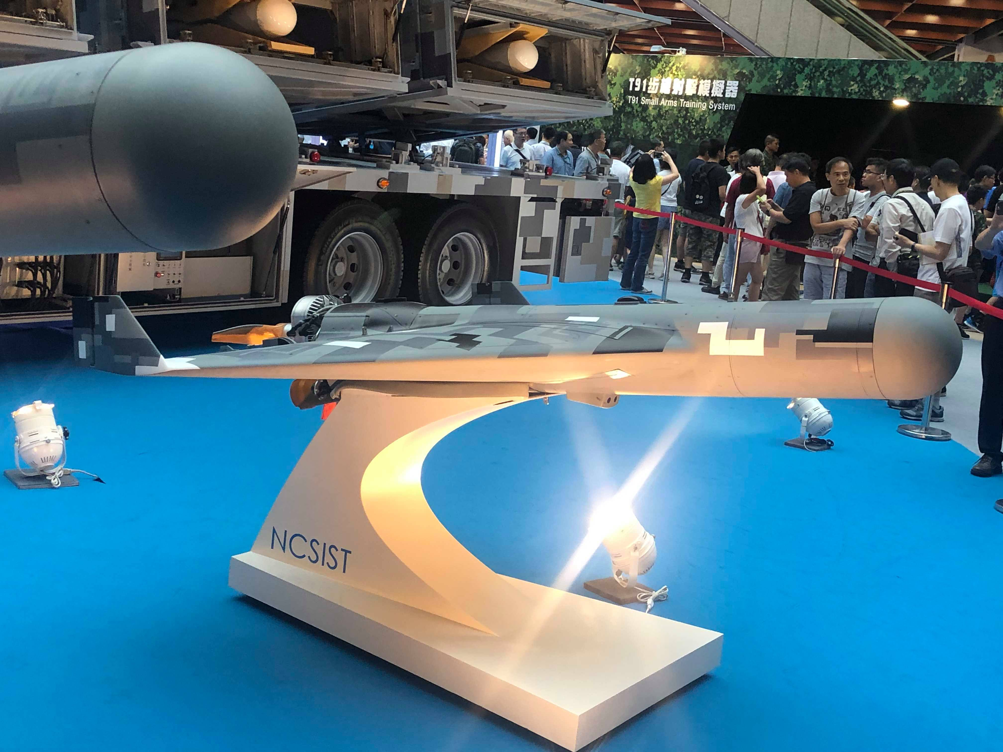 Loitering munition designed by NCSIST,Republic of China